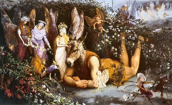 oeuvre de l'artiste John Anster Fitzgerald